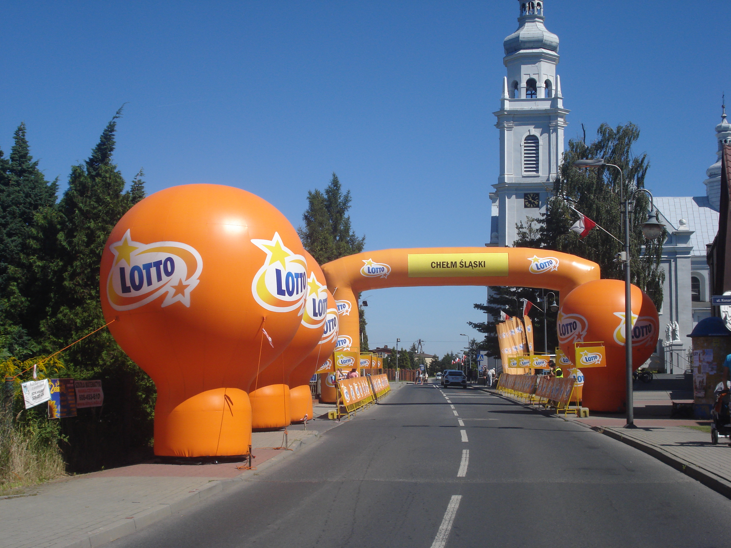 Tour de Pologne Etap IV Jaworzno-Szczyrk Premia lotna Chełm Śląski